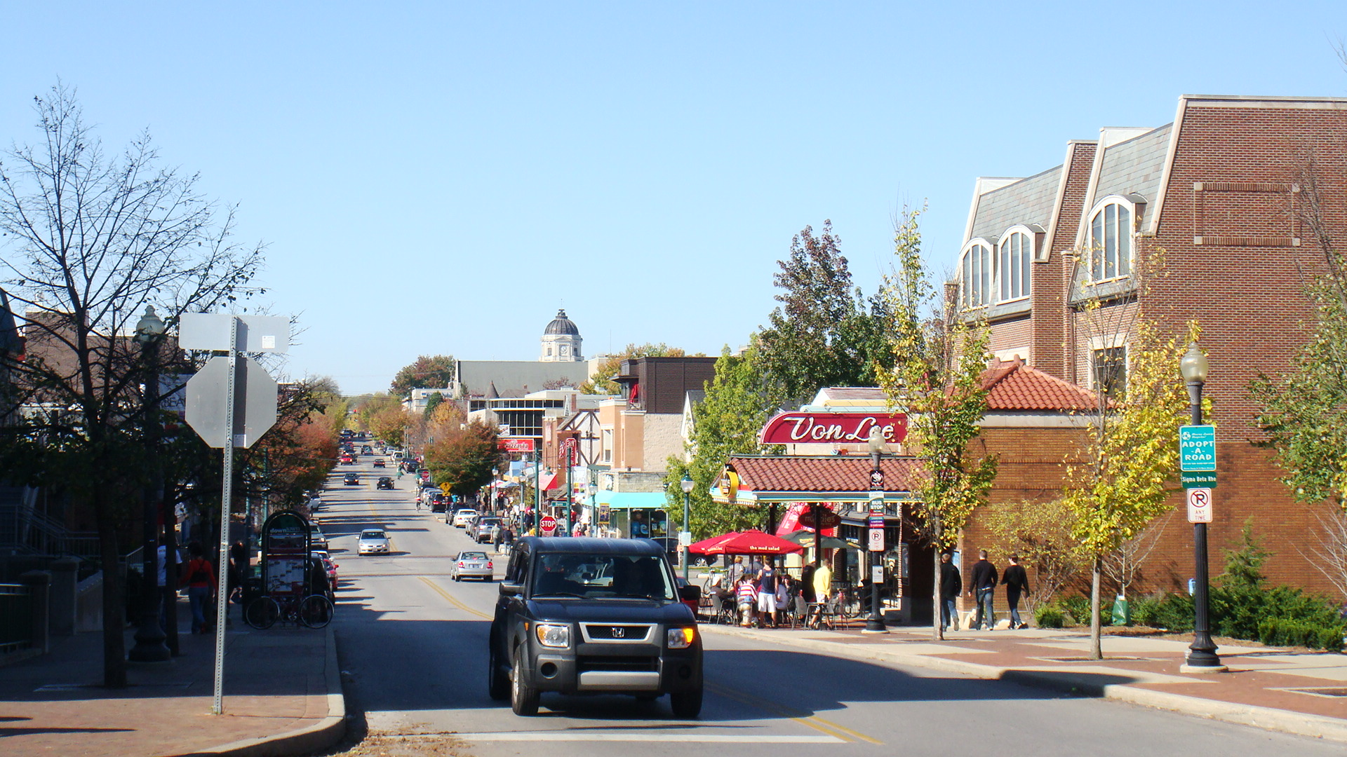 Kirkwood Ave, Bloomington.